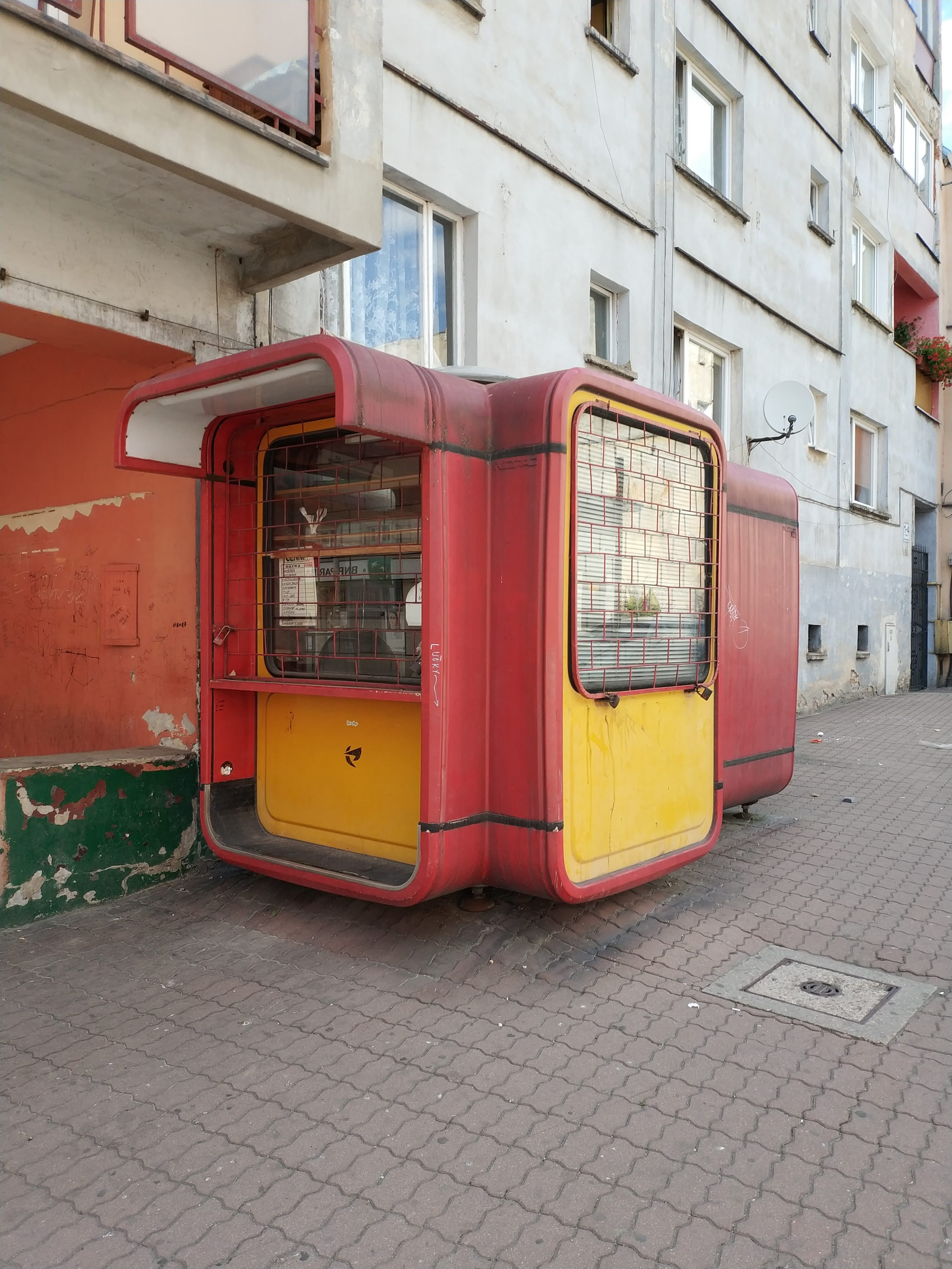 Kiosek K-67 v polském Jawoře.